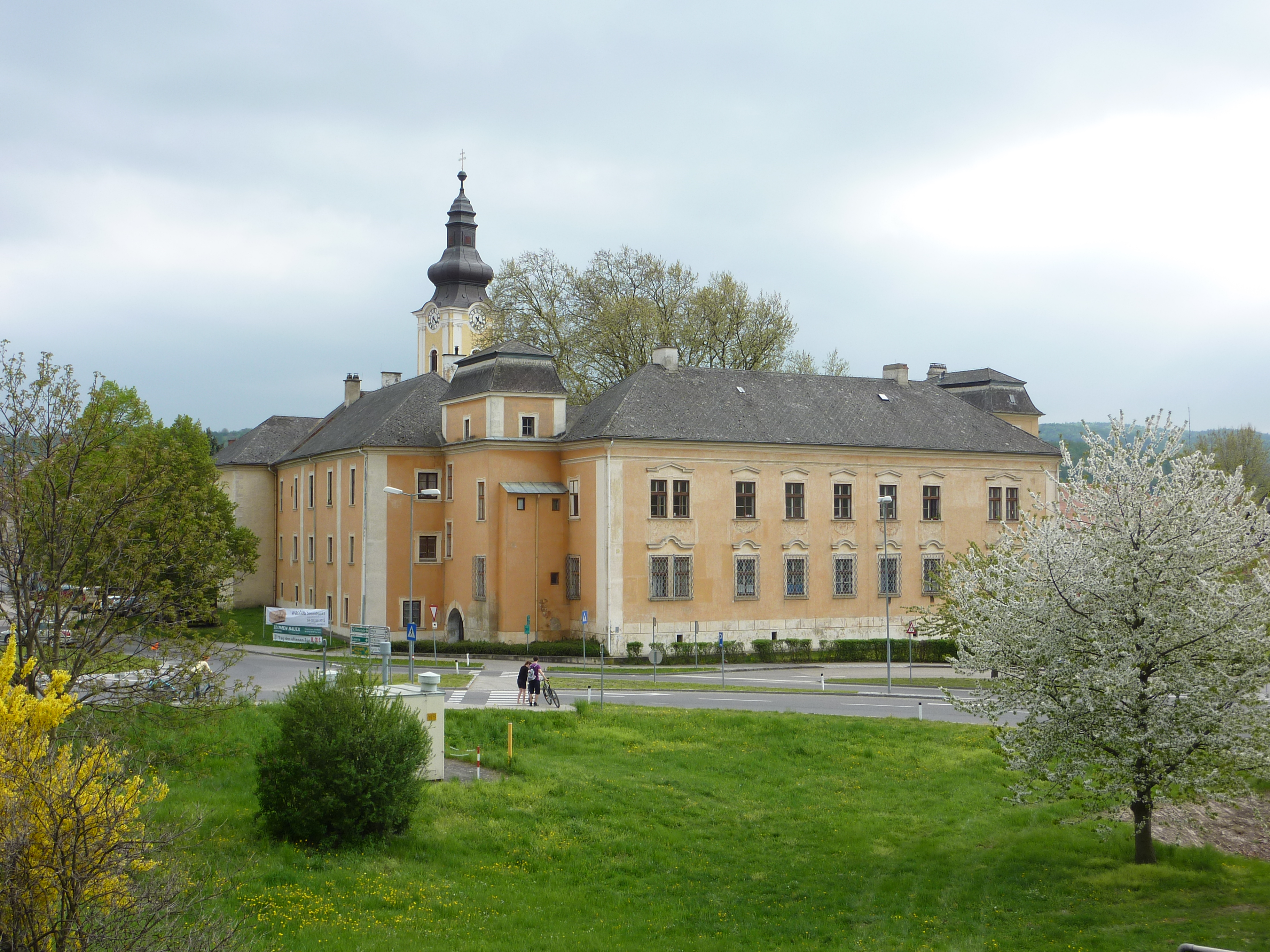 Schloss, Mautern an der Donau in Niederösterreich